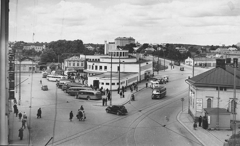 Turun linja-autoasema sodan jälkeisinä vuosina. Kuvassa näkyy myös Aninkaistensilta ja sillä kulkeva linjan 1 raitiovaunu.